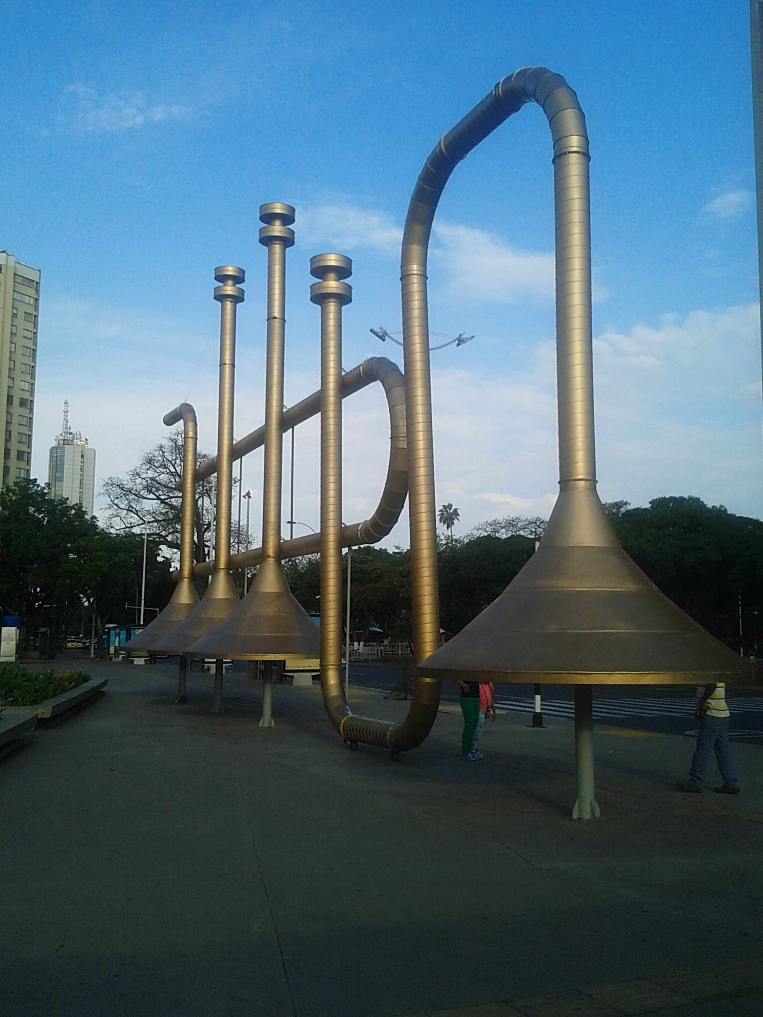 Niche: Escultura en homenaje a Jairo Varela Esta fotografía fue tomada en el municipio colombiano con código 76001.